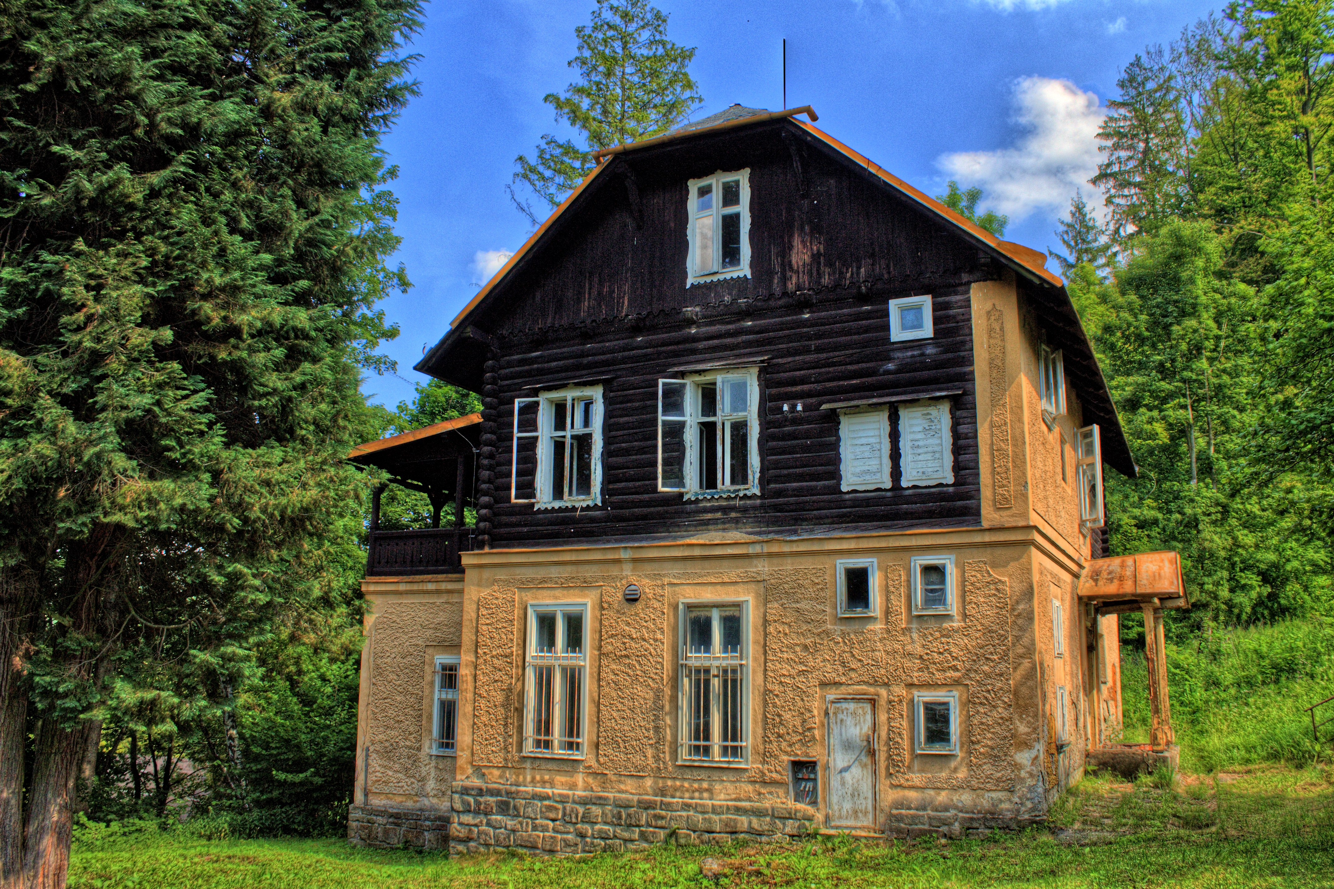 Lázeňský dům - areál lázní, s omezením: bez čp. 105 Penzion Marie na pozemku st. parc. č. 105, k. ú. Staré Těchanovice a pozemku parc. č. 1164, k. ú. Moravice (Jánské Koupele), Jánské Koupele 75